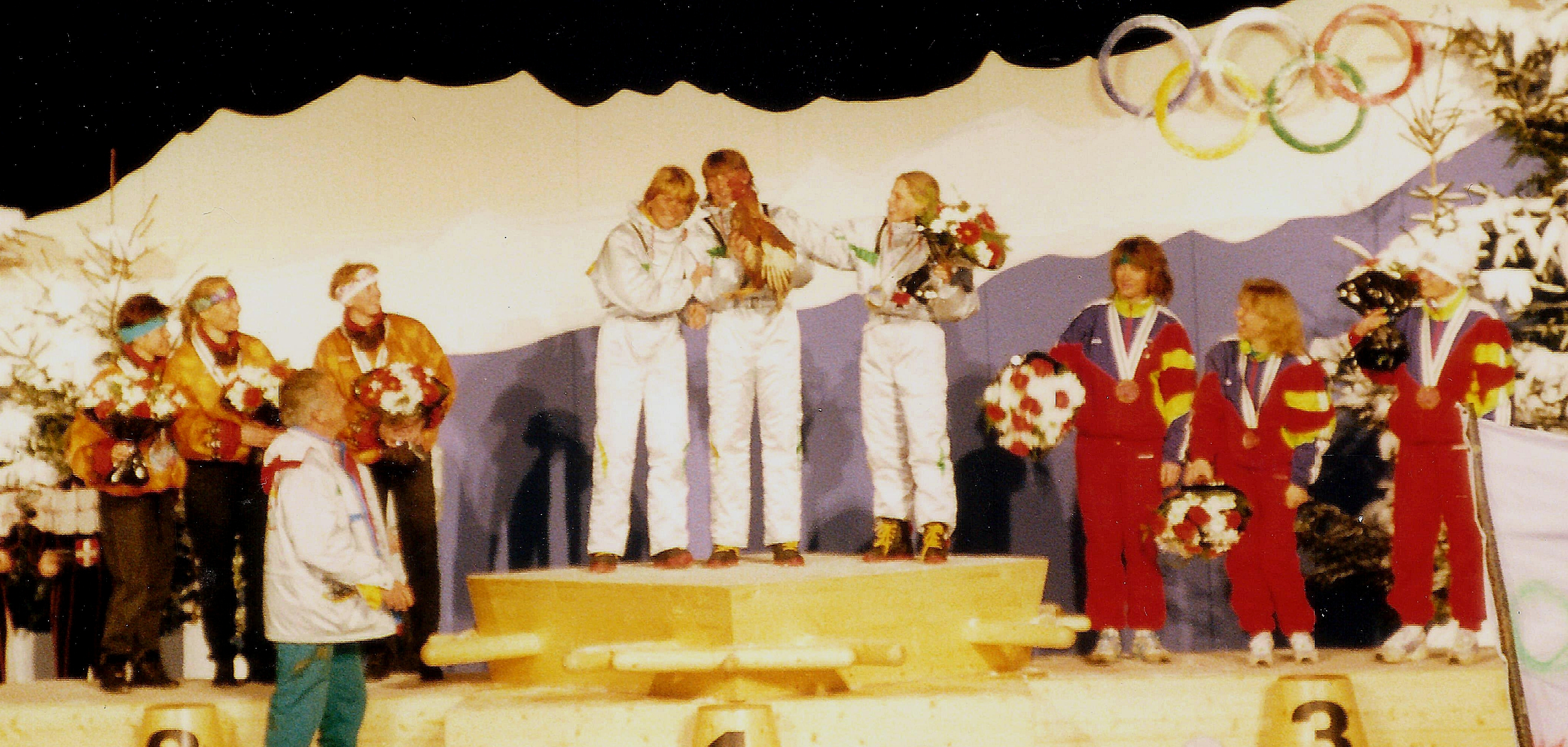 Cérémonie de remise des médailles du relais femmes 3×7,5 km biathlon.